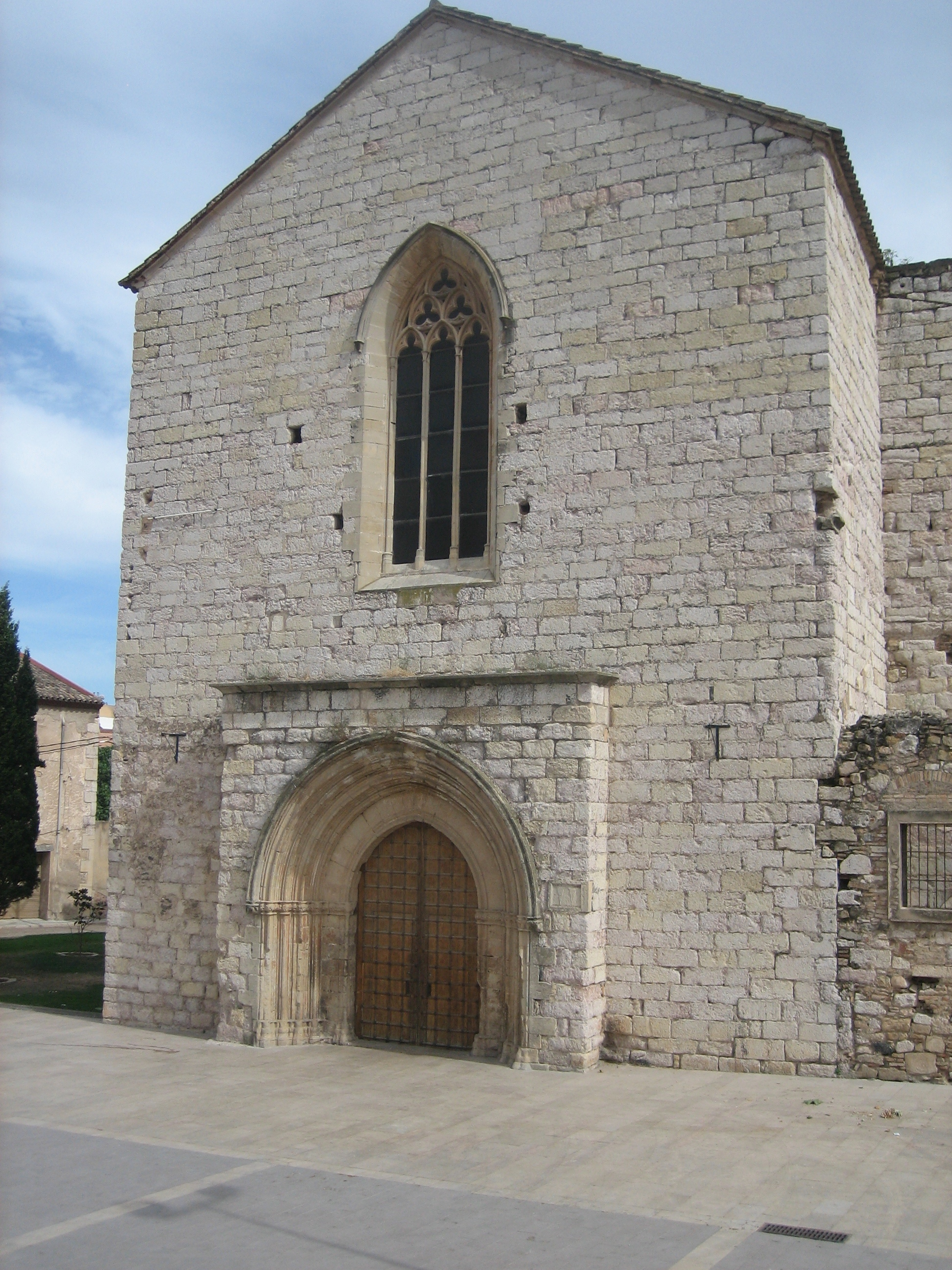 Església del convent de Sant Francesc de Montblanc (Conca de Barberà)